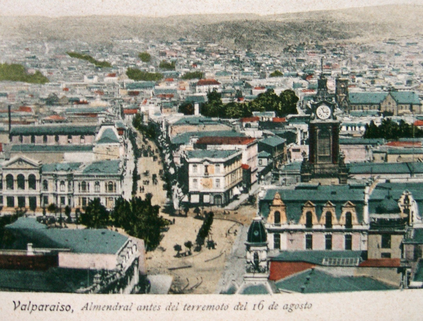 Esta postal muestra como era el área que va desde la plaza Victoria hacia el oriente, antes del terremoto de 1906. La primera calle de la izquierda es la Avenida Victoria (actual Pedro Montt), la de la derecha es la calle Victoria (actual Independencia). A la izquierda de la actual P.Montt se puede ver la mansion de Agustín Edwards(actual catedral de Valparaíso), que fue arrasada por el terremoto, así como la iglesia Espíritu Santo(actualmente un edificio de departamentos), de la que se ve su torre con reloj, a la derecha y al fondo de la torre se ve la Iglesia de los Sagrados Corazones. El machón verde del medio de la postal es el parque Italia.